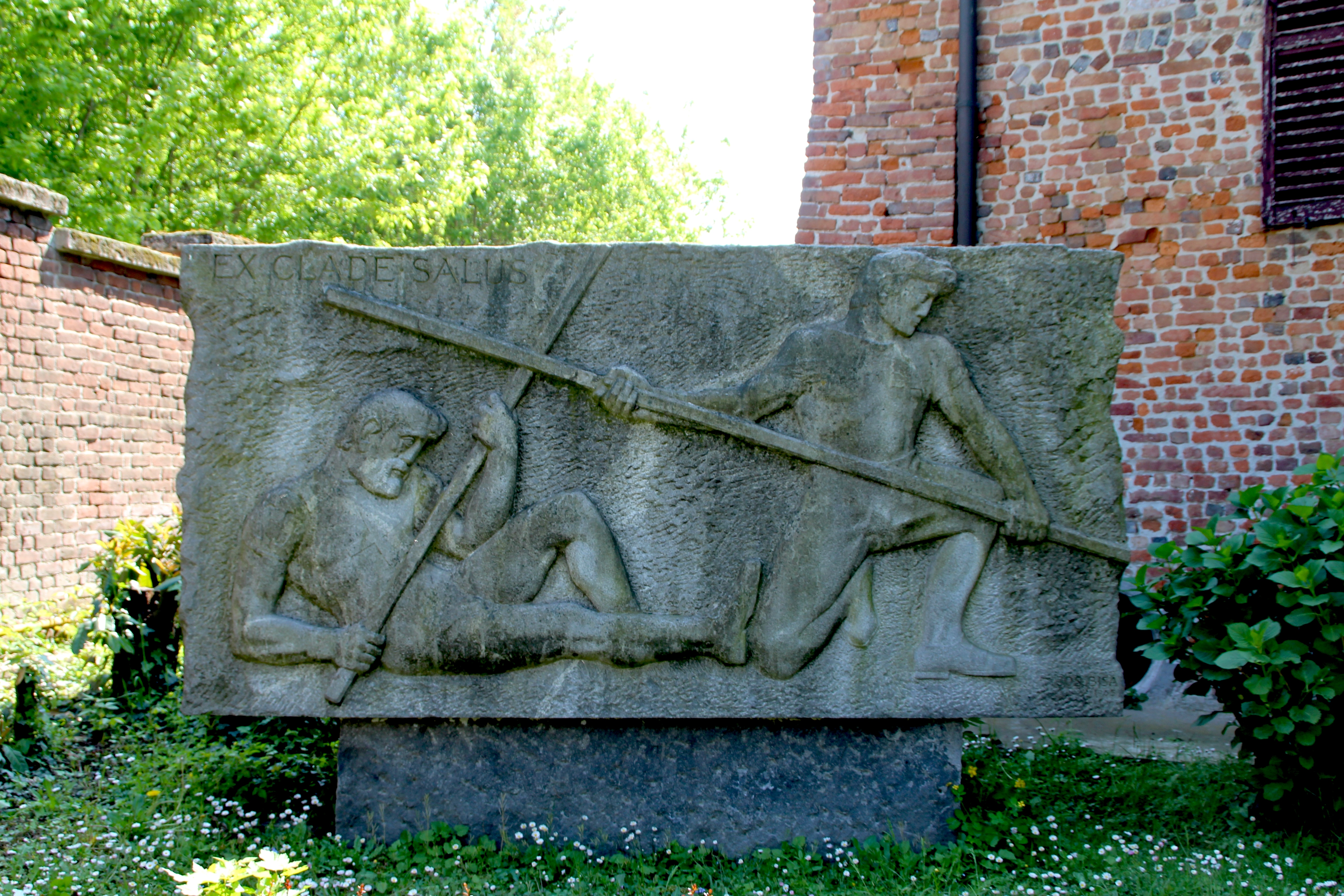 Denkmal an die Schlacht von Marignano 1515 in Zivido bei San Giuliano Milanese von Josef Bisa